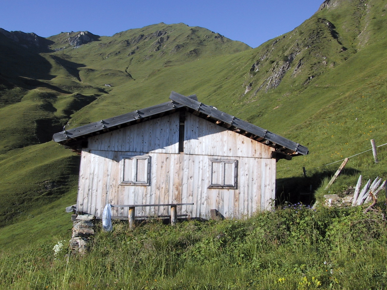 Zirmalm in Pfunders. Der Pfunderer Höhenweg führt in Sichtweite daran vorbei